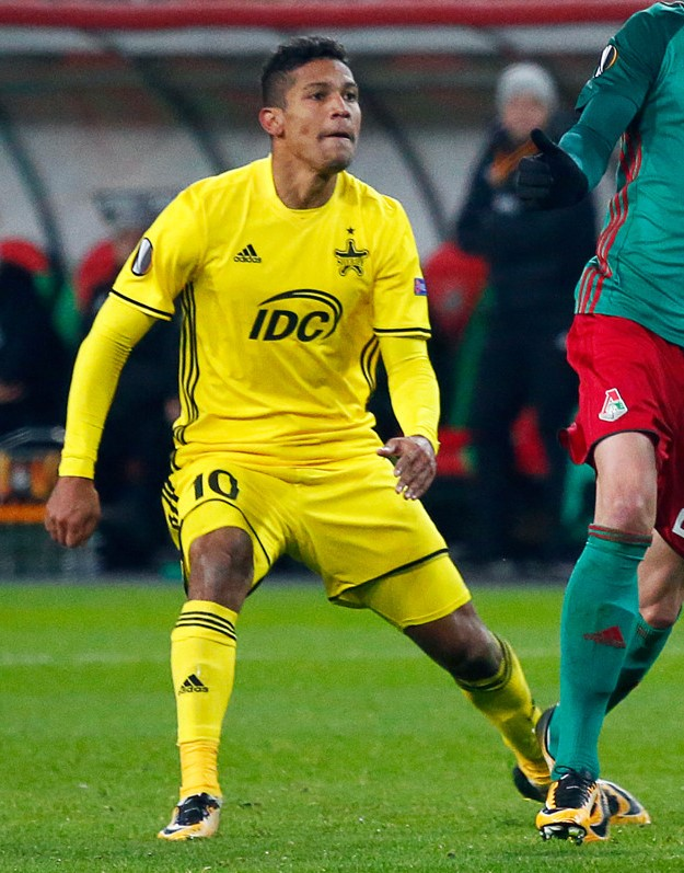 Jairo de Macedo da Silva